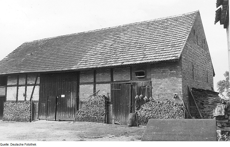 Original image description from the Deutsche Fotothek Hähnichen-Quolsdorf. Ehem. Wassermühle am Schöps beim Rittergut, Wirtschaftsgebäude